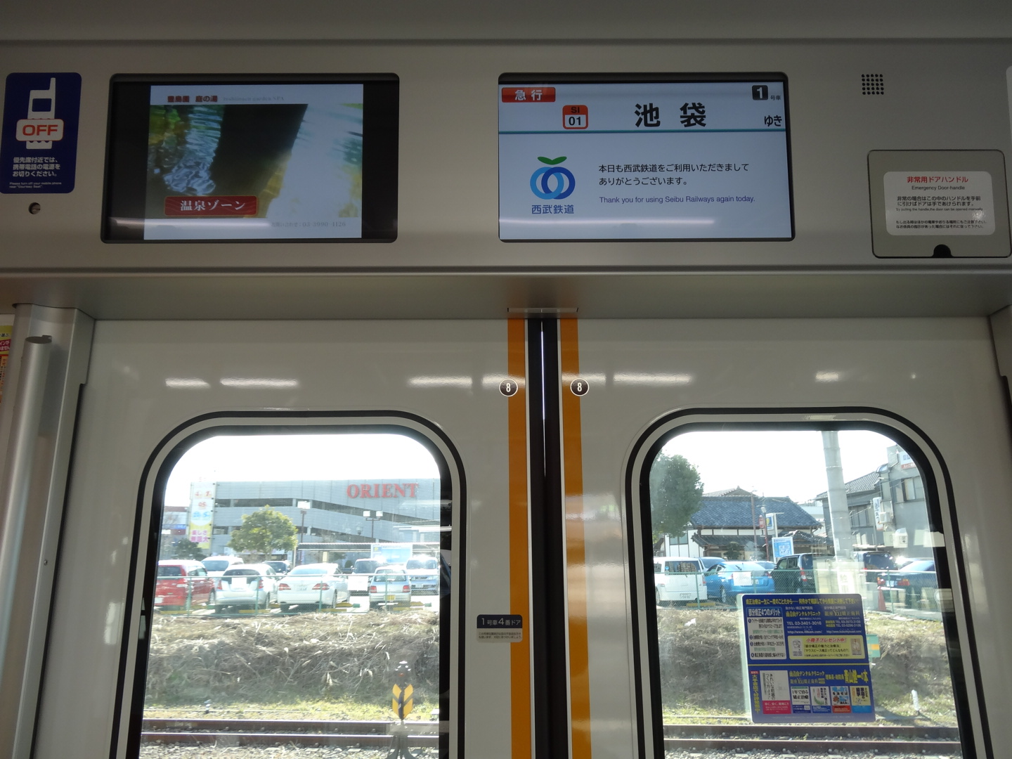 西武30000系（7次車）の鴨居部案内表示器